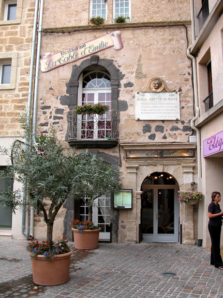 Photo personnelle de la maison natale d'Achille Maffre de Baugé à Marseillan (Hérault, France) - Eté 2006.